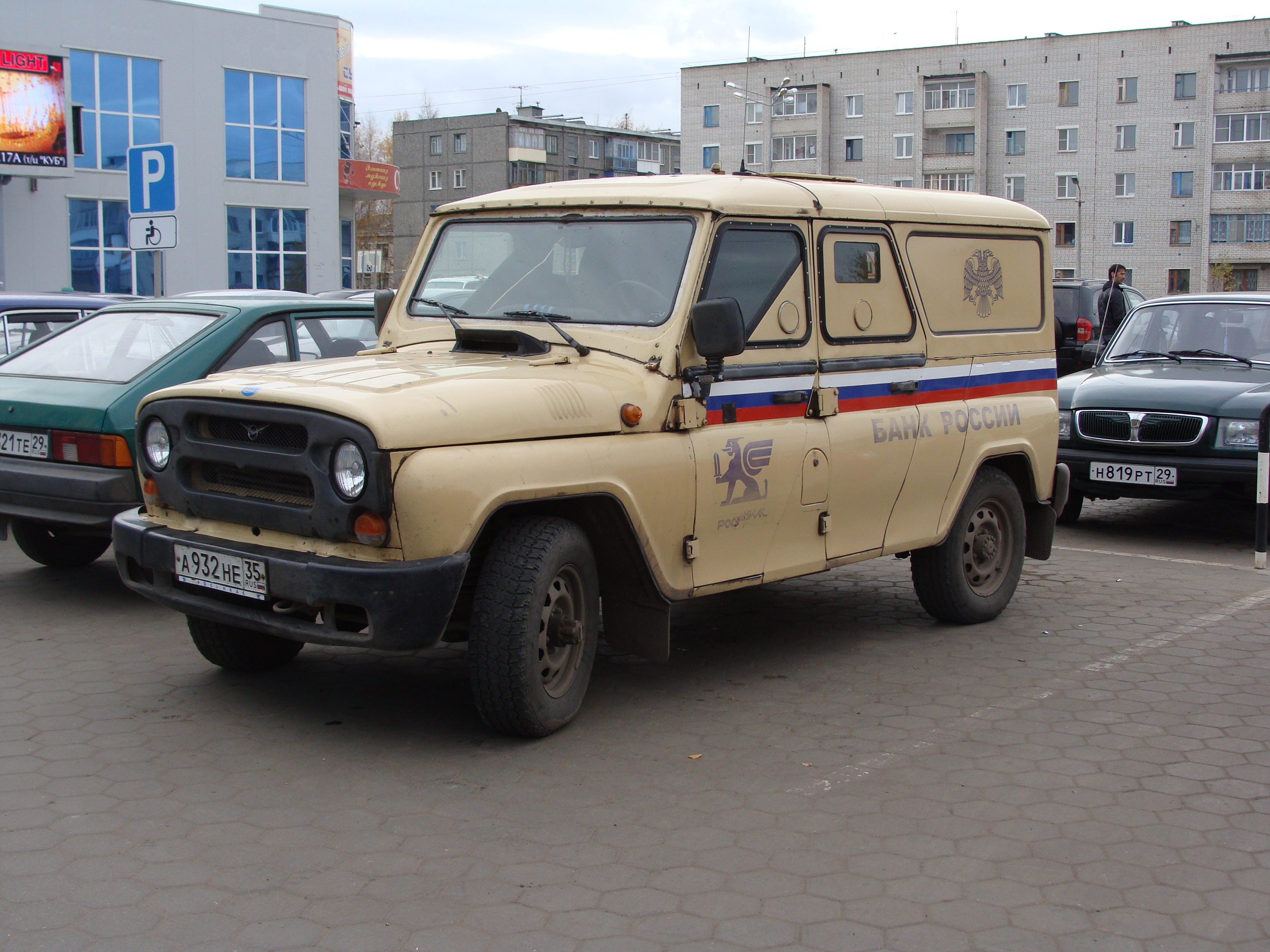 УАЗ-469. Банк России